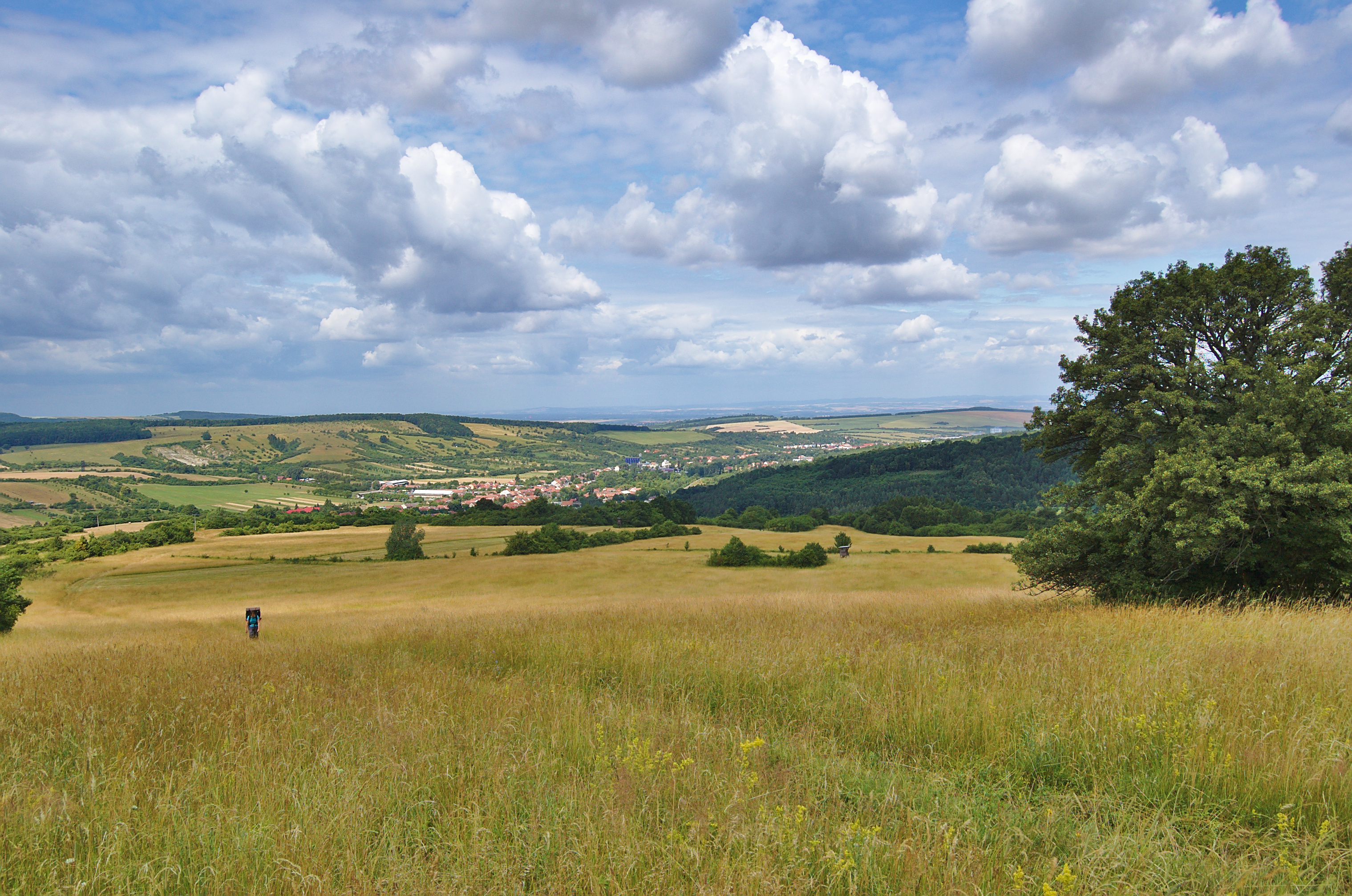 Pohled na Javorník a Velkou nad Veličkou od východu, okres Hodonín